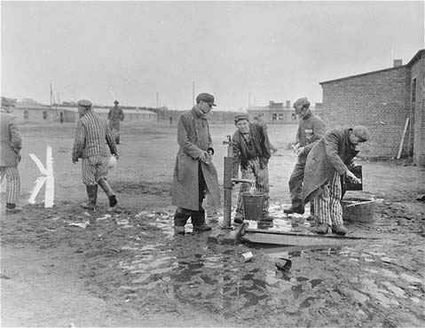 Häftlinge holen Wasser im KZ Wöbbelin